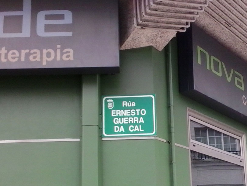 Placa rúa Ernesto Guerra da Cal en Ferrol A Coruña Galiza Spain